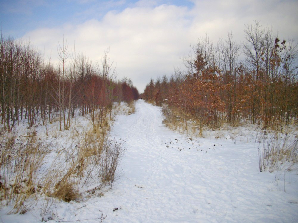 Standort des ehemaligen Dorfes Prödel bei Markkleeberg im Waldgebiet Neue Harth, Landkreis Leipzig